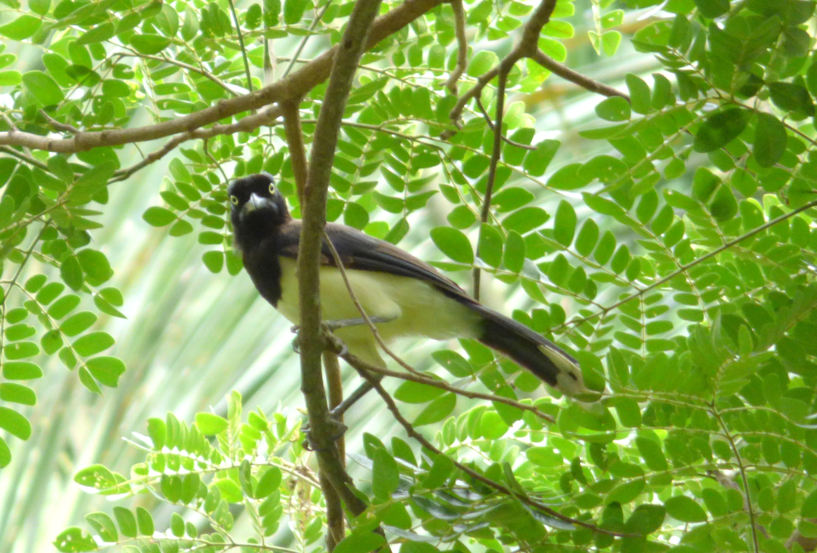 Cyanocorax affinis (Carriquí pechiblanco)